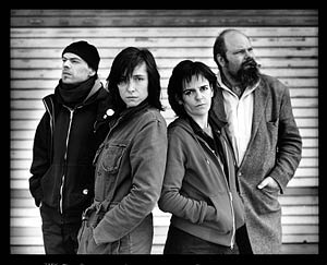 Tg STAN (from left to right): Frank Vercruyssen, Sara De Roo, Jolente De Keersmaeker, Damiaan De Schrijver / foto Stephan Vanfleteren